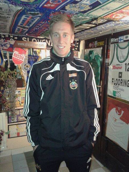 Fotograf : Mirsad K.Cavalic Datum in čas ustvaritve podatkov : 22:27, 17. januar 2015 Naslov slike : Robi na obisku v domačem kraju